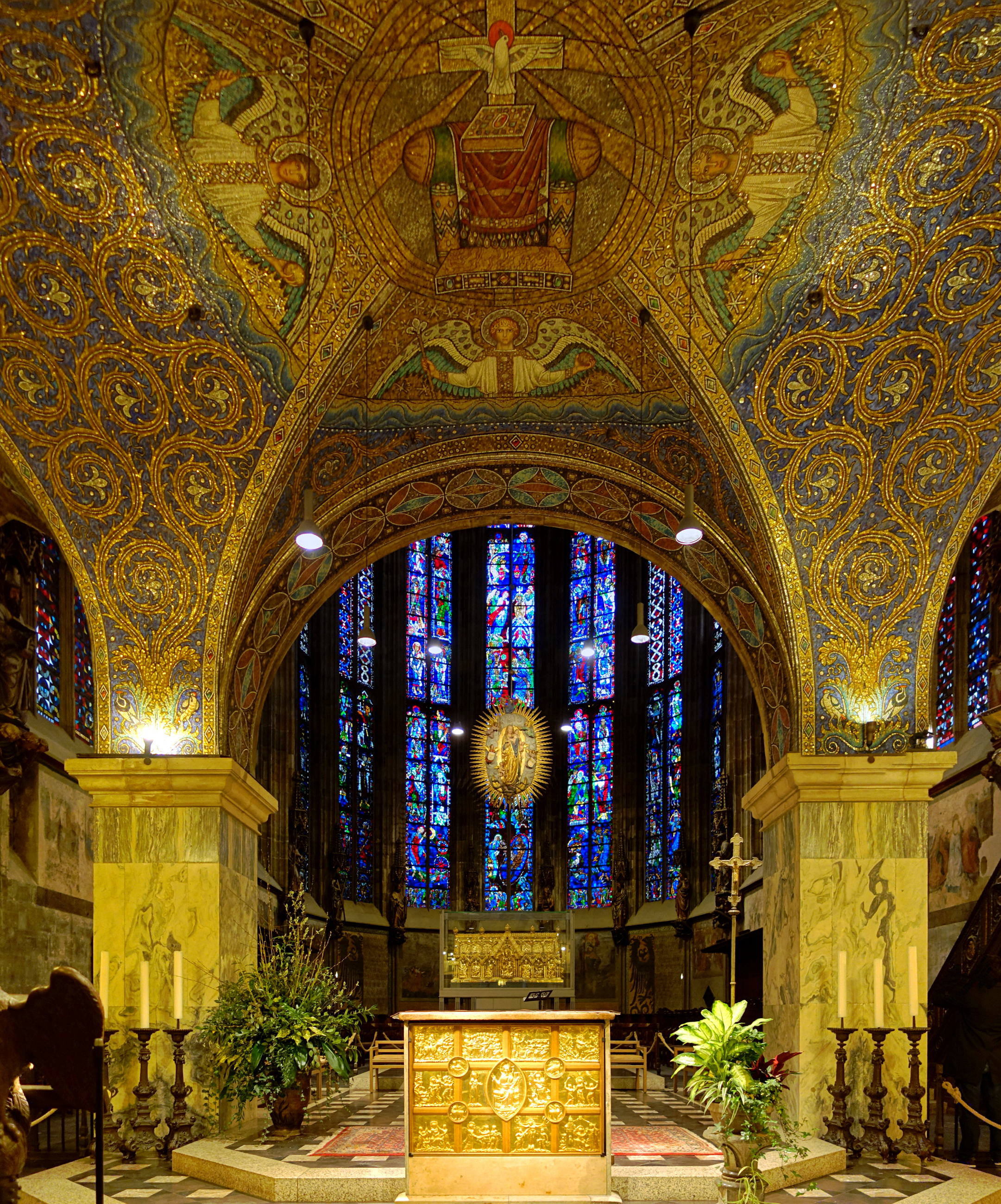 Le chœur de la chapelle palatine d'Aix-la-Chapelle.